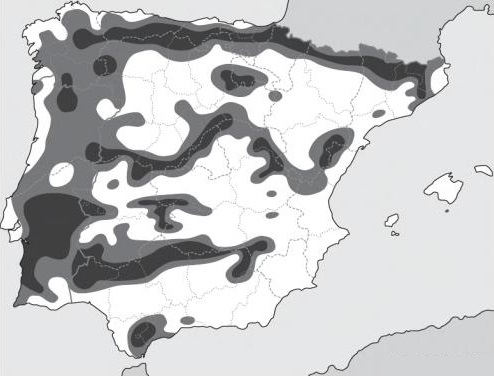 Mapa de la distribución de Sitta europaea en la península ibérica.